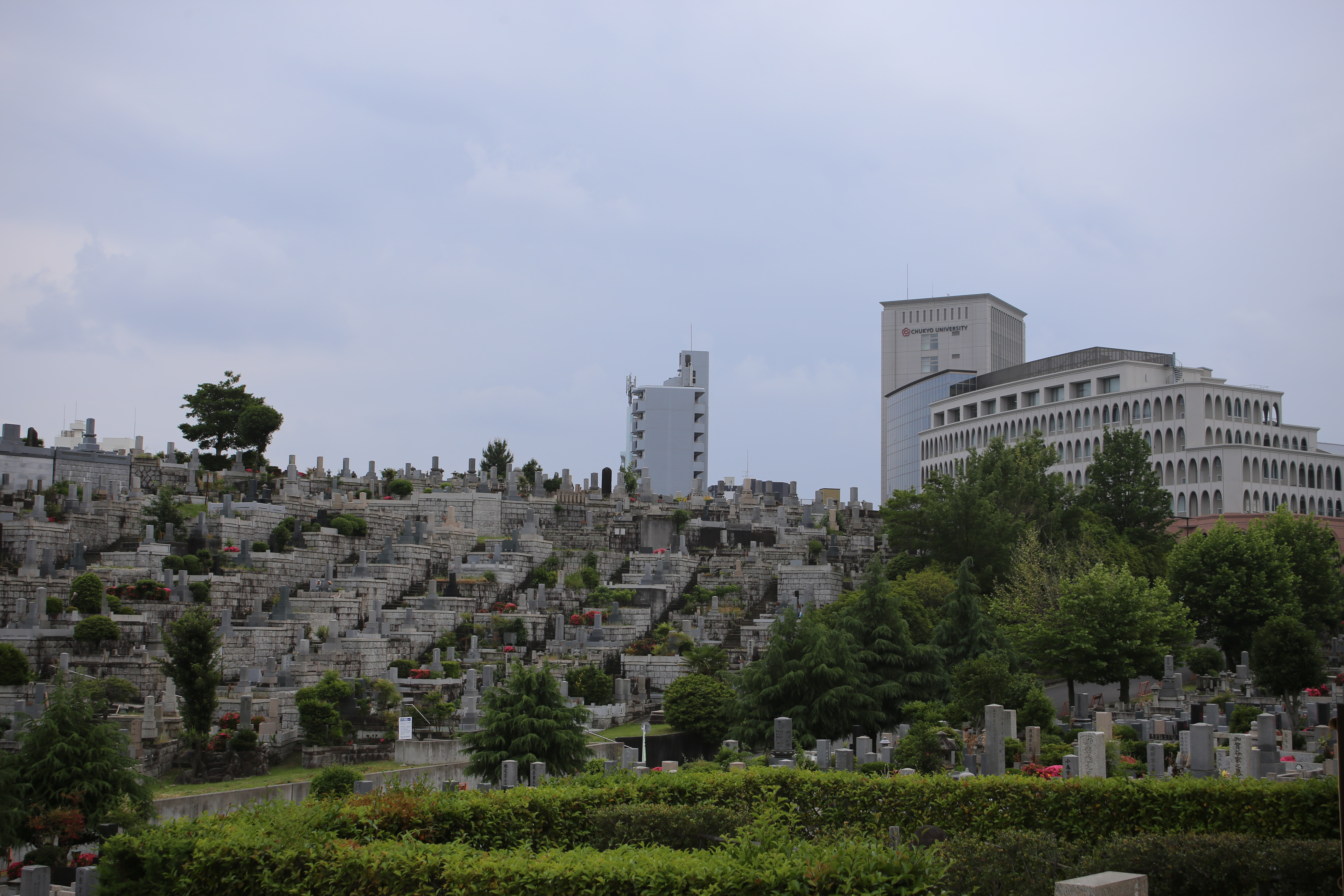 名古屋市昭和区・天白区の八事霊園を北側公道より撮影